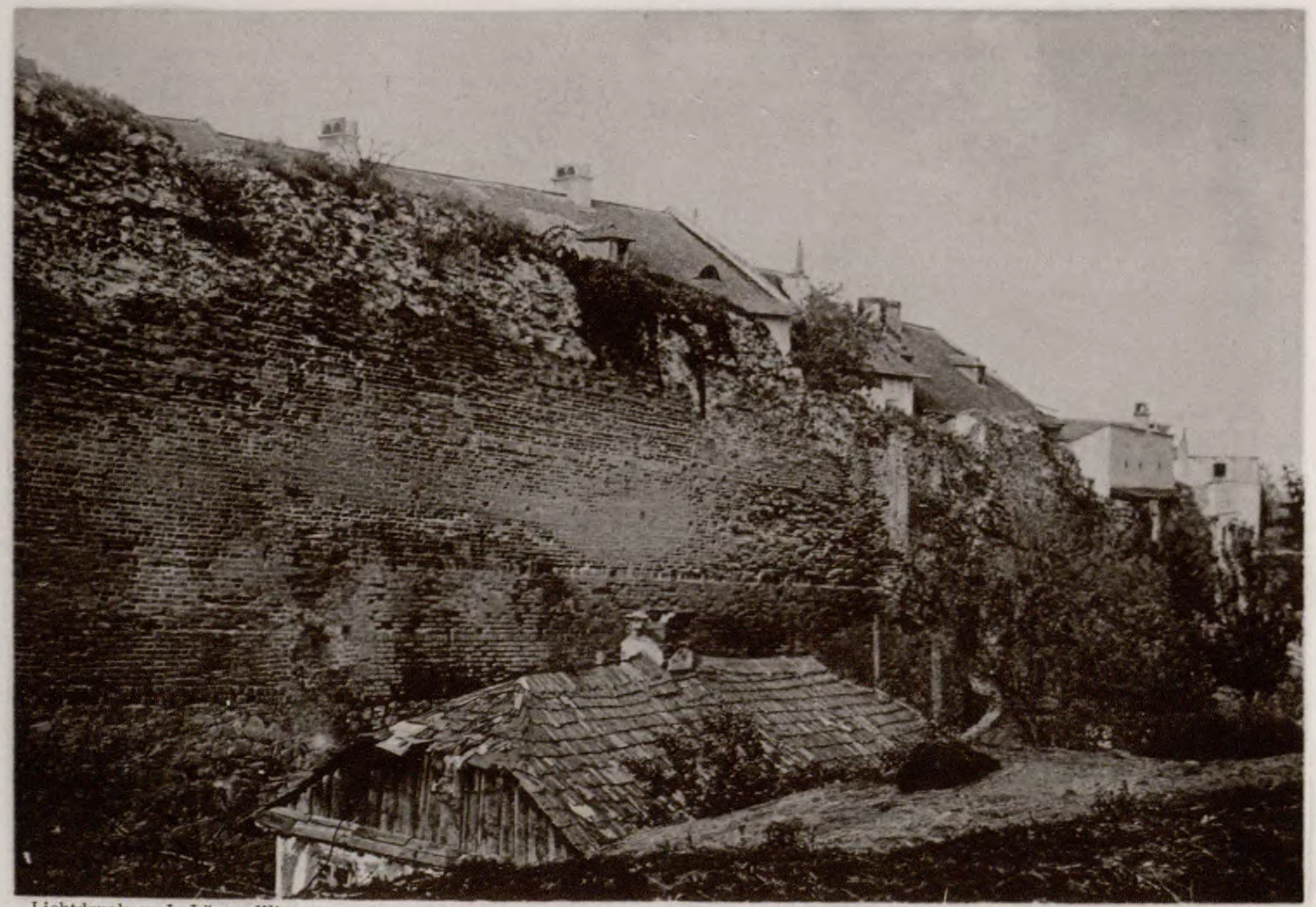 Залишки міських мурів у Перемишлі.